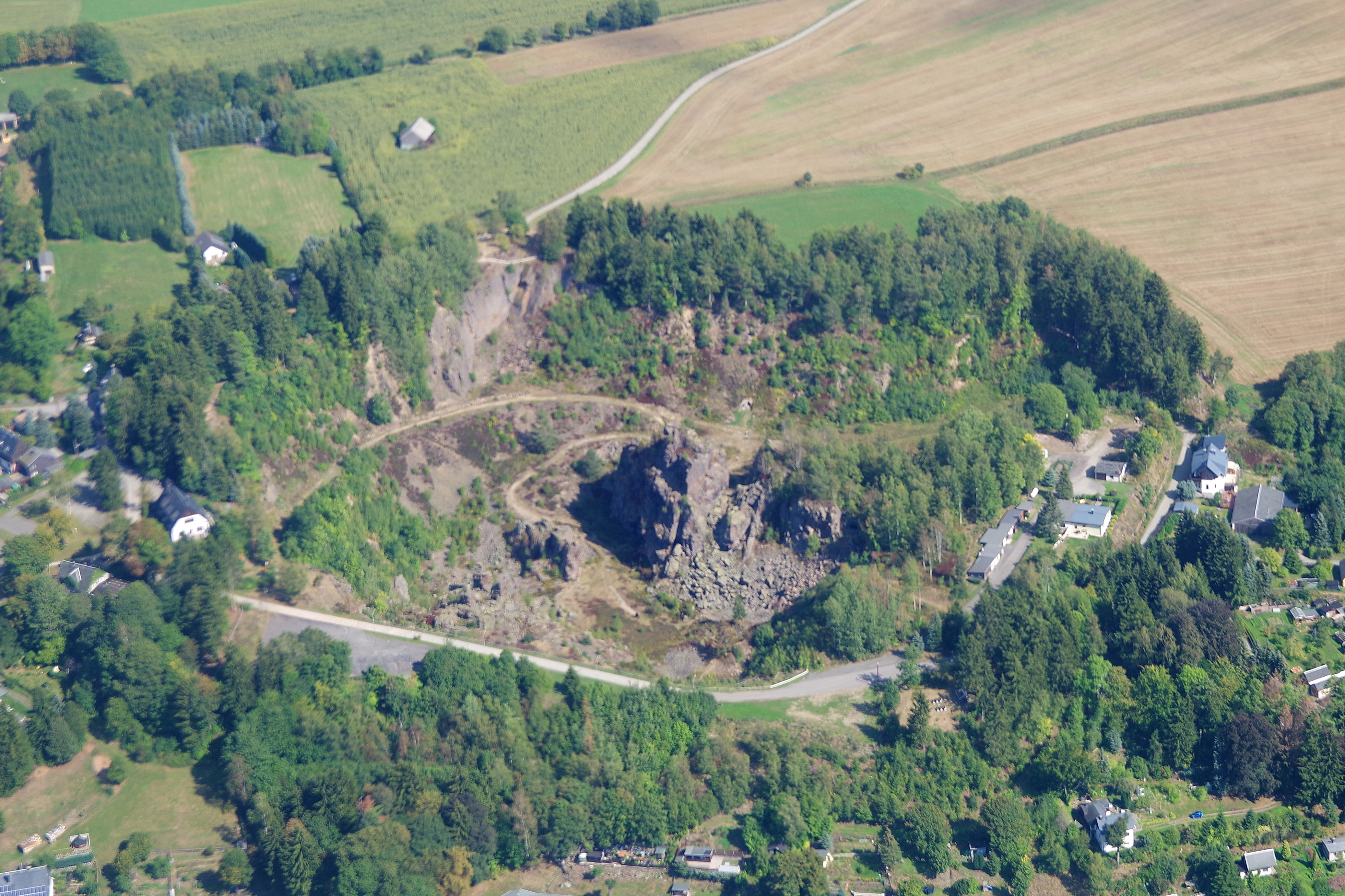 Luftaufnahme der Geyerschen Binge